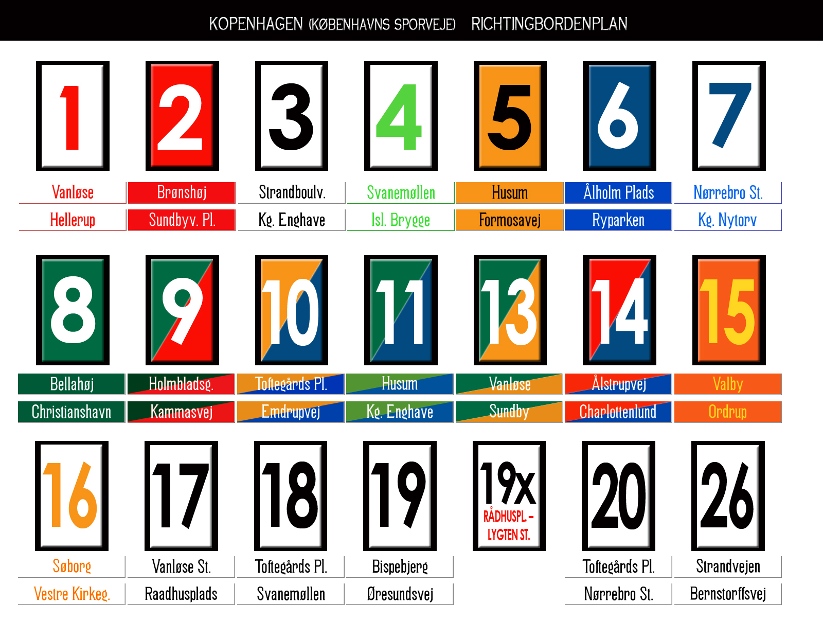 Zelfgetekende media in Photoshop CS